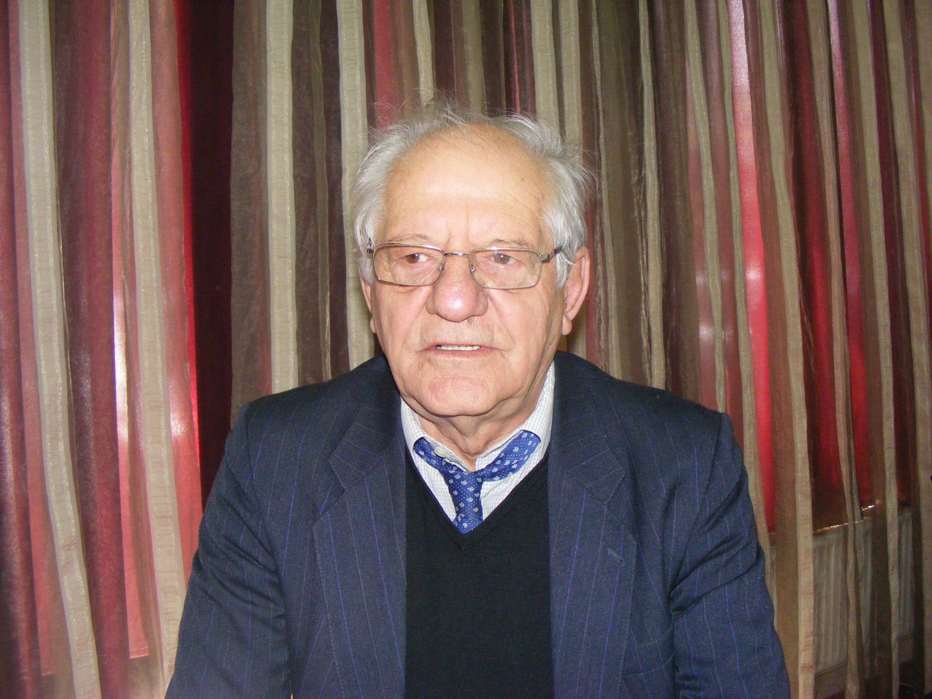 Neha Islami, gazetar